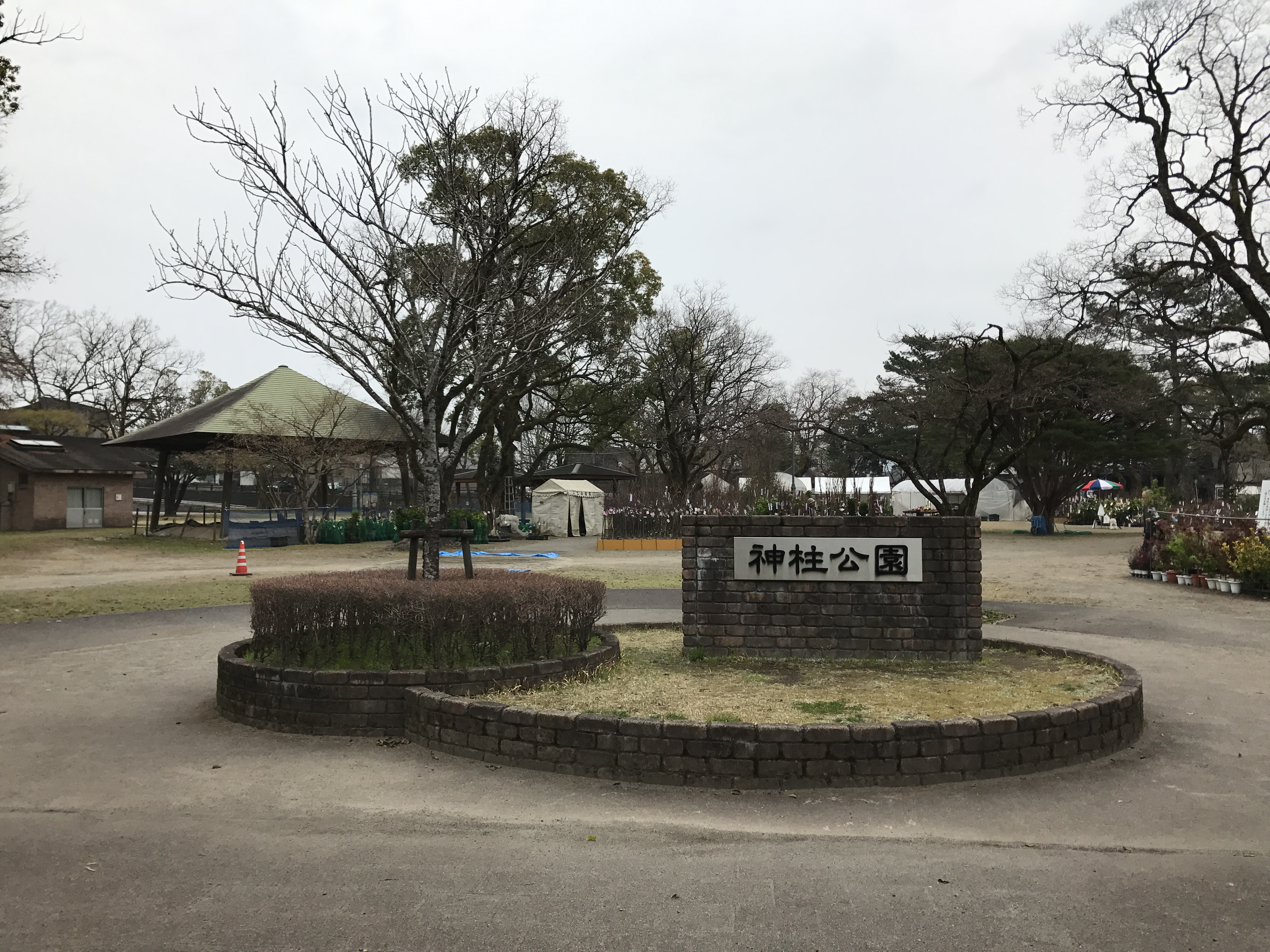 宮崎県都城市・神柱公園